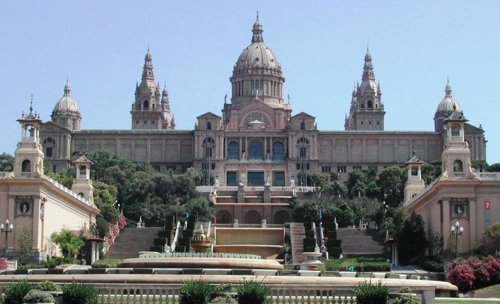 Museu d'Art de Catalyna zu Barcelona